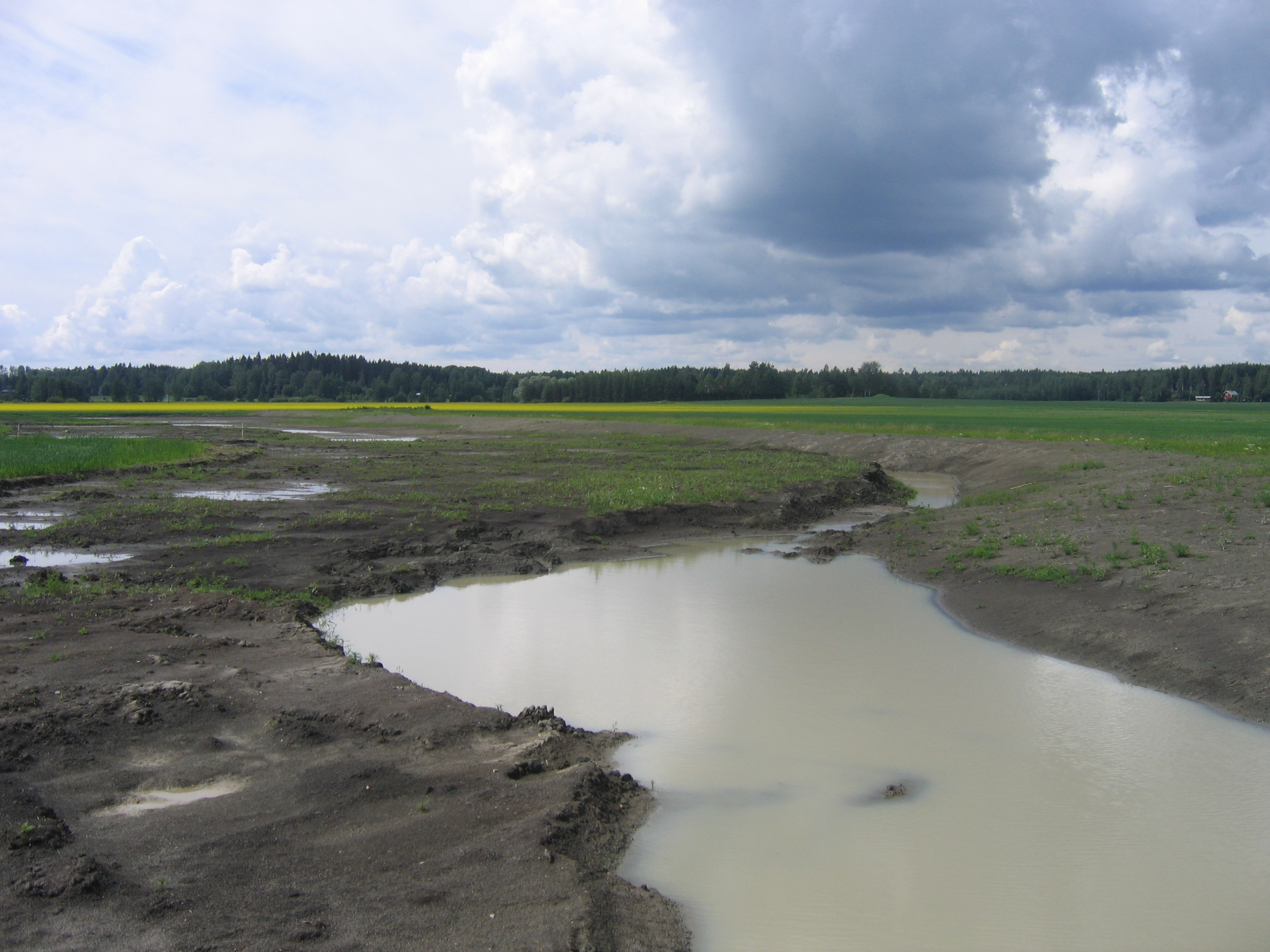 Sarsalanoja